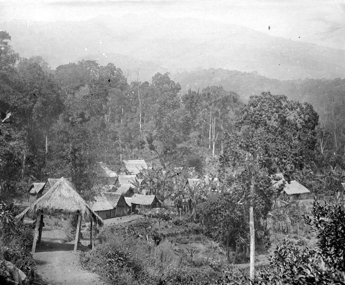 Negatief. Huizen in bos bij het dorp Plembon